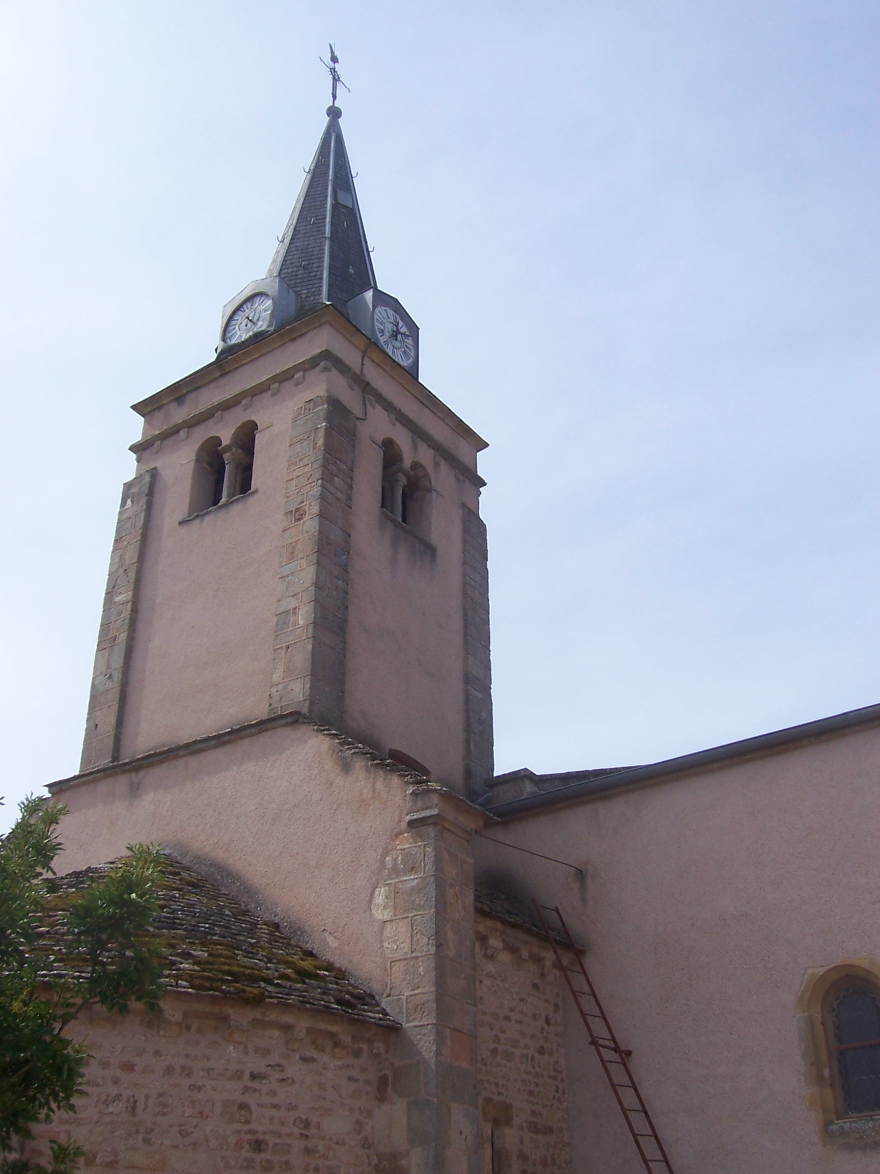 Eglise de Trivy